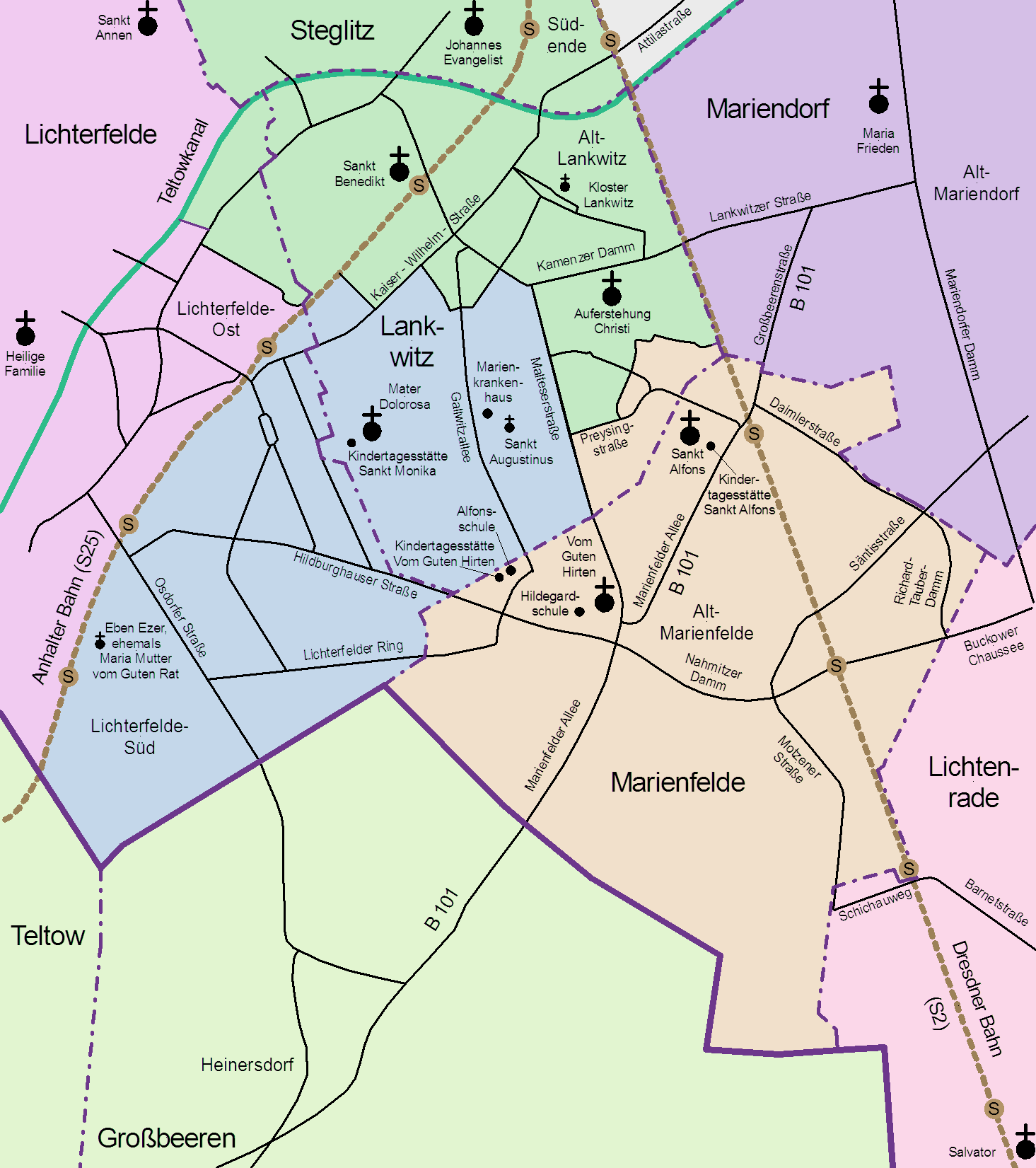 Karte des Pastoralen Raumes Lankwitz-Marienfelde im Erzbistum Berlin